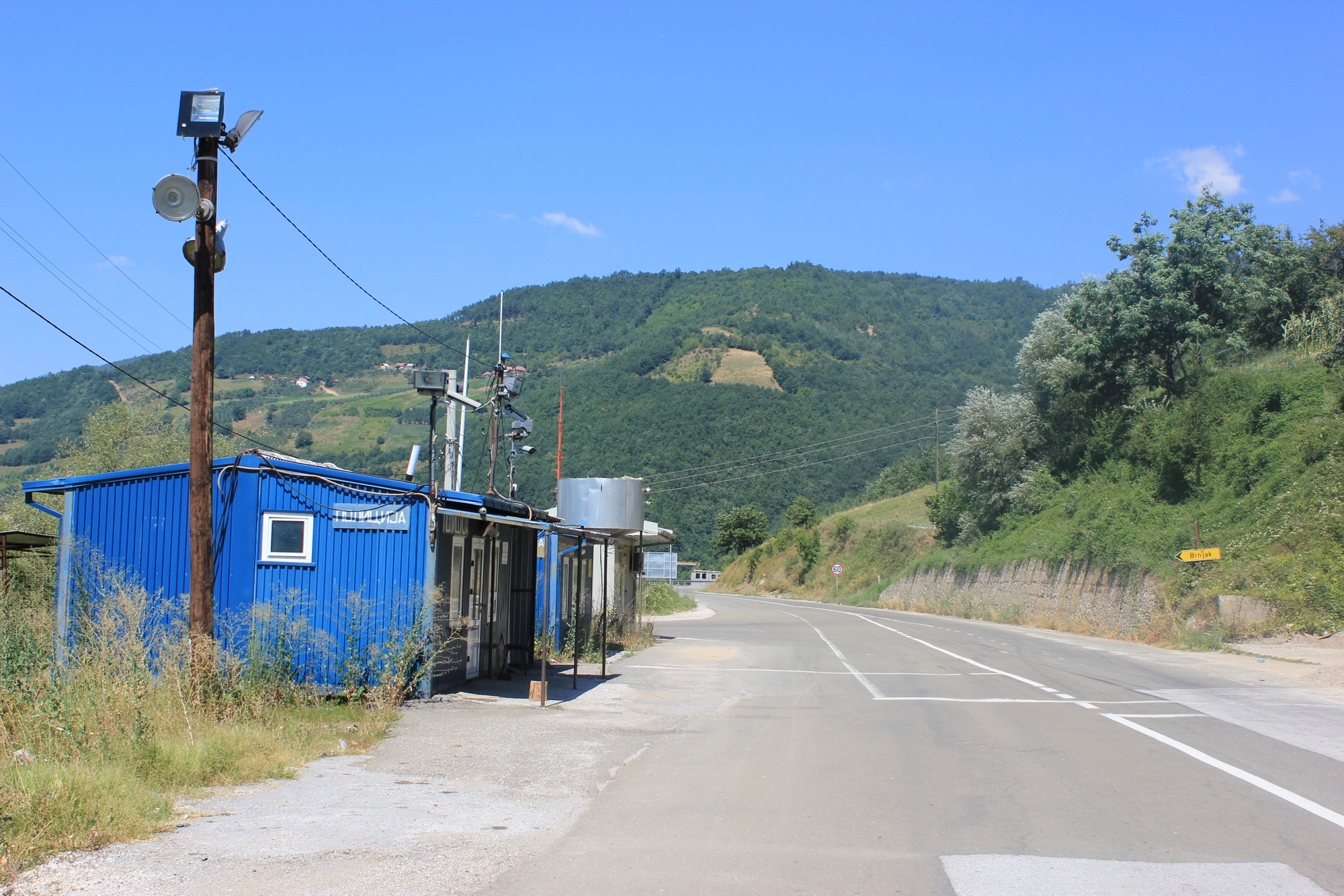 Verlassene Kontrollstation an der Grenze zwischen Serbien und Kosovo bei Brnjak (serbische Seite).